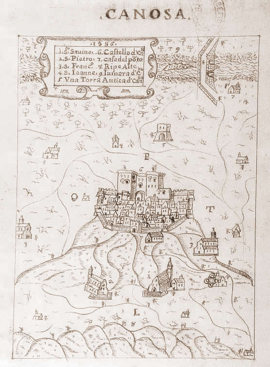 Medievale mappa della città di Canosa